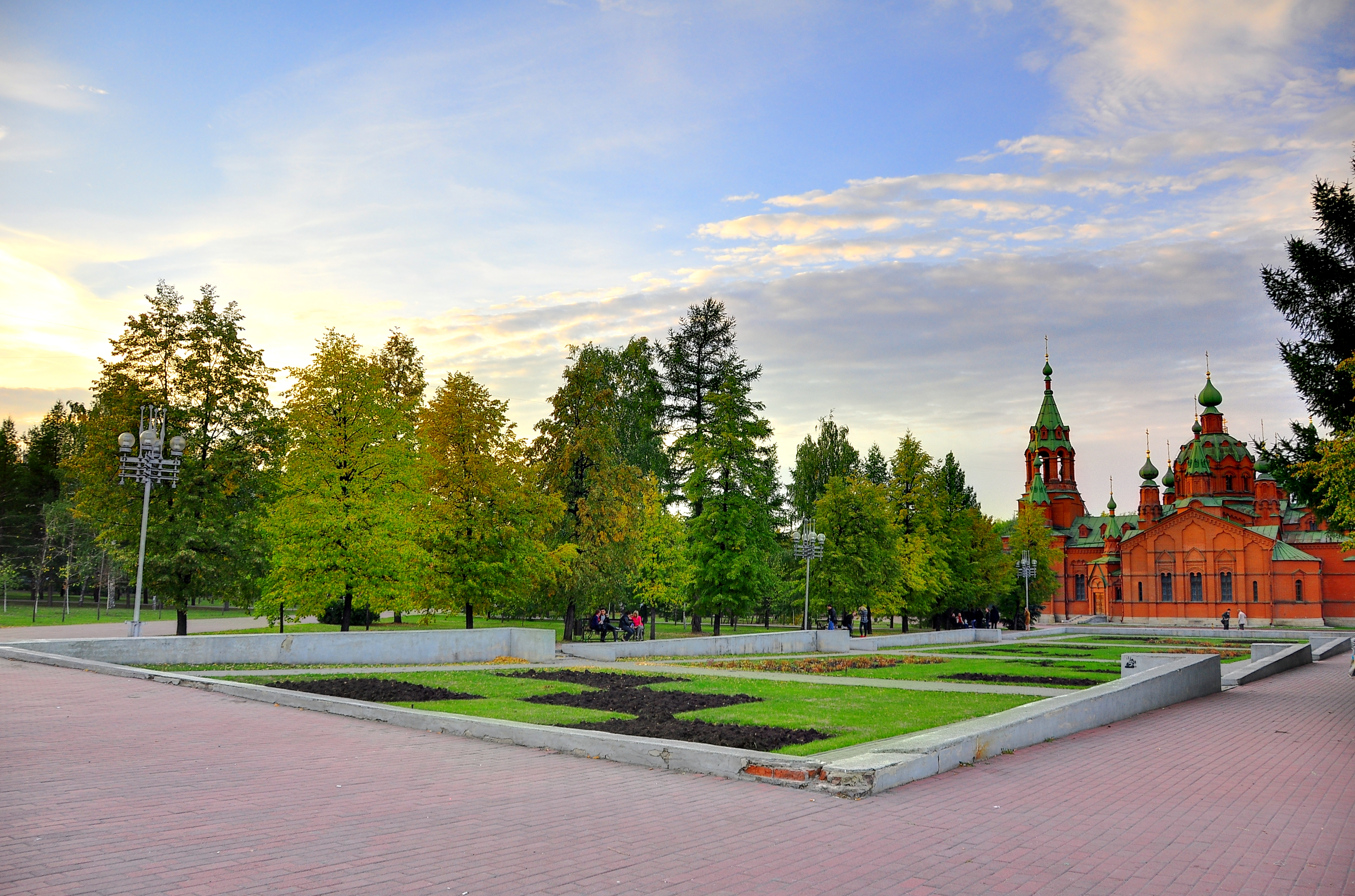 сквер на Алом поле